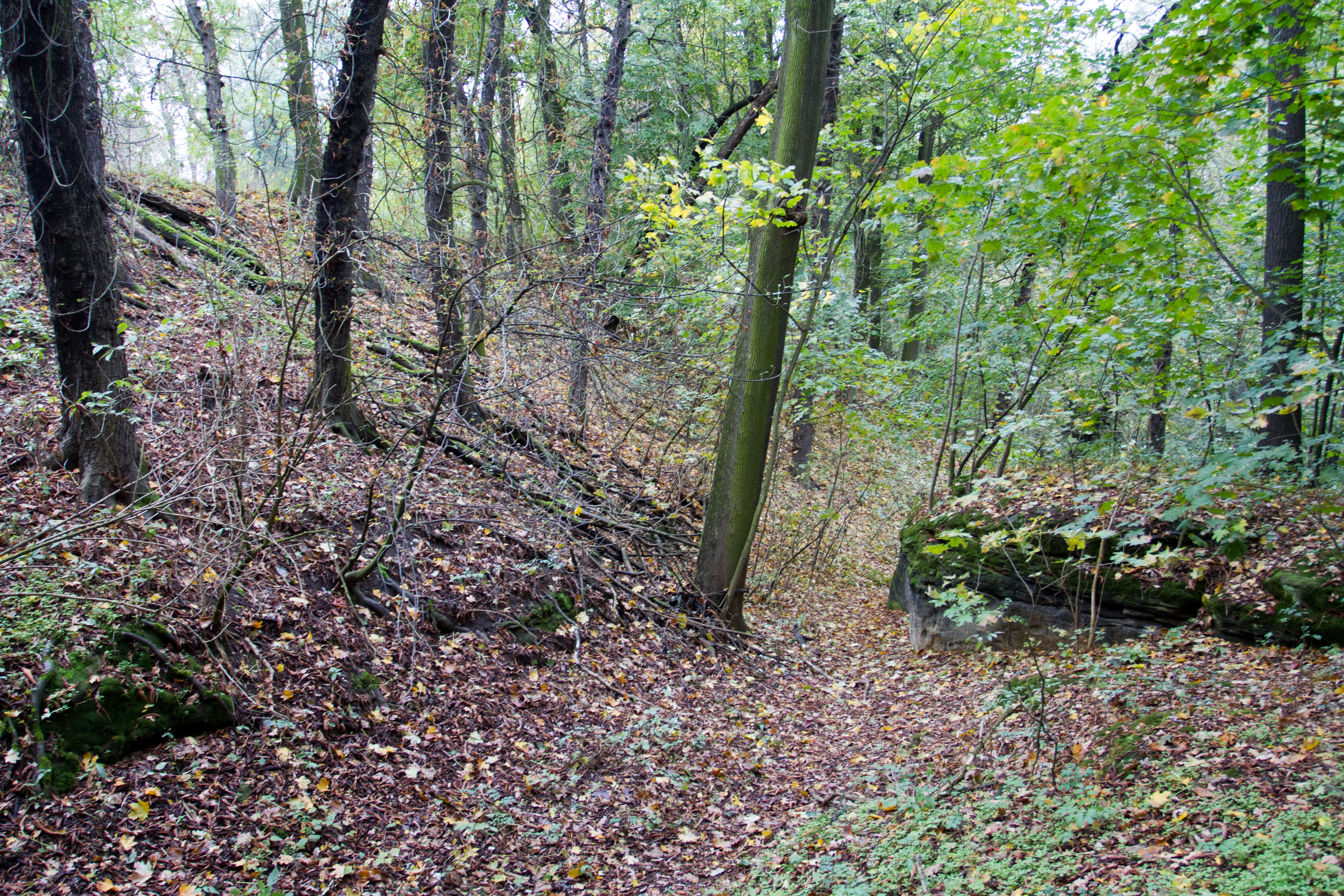 Hradiště, jižně od obce, Bažantnice, Vinoř.